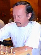 Jozsef Pinter, Recklinghäuser Schachtage 1998.